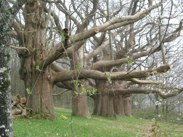 Châtaigners Castanea sativa, lisière forêt de la Charnie, le Haut-Essart Ste-Suzanne (Mayenne)